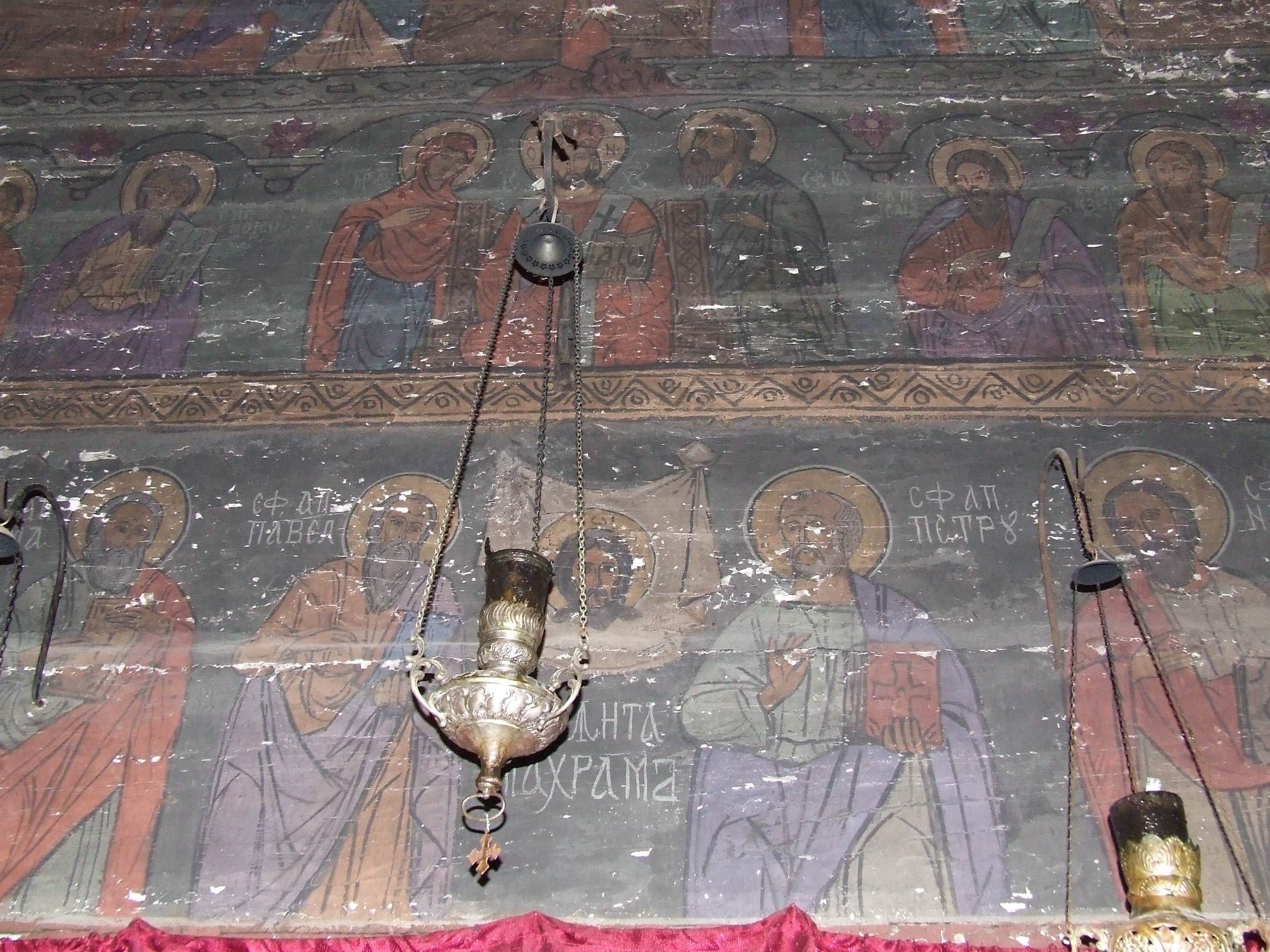 Biserica de lemn din Gălgău, judeţul Sălaj. Iconostasul Autor: Bogdan Ilieş Data: mai 2007